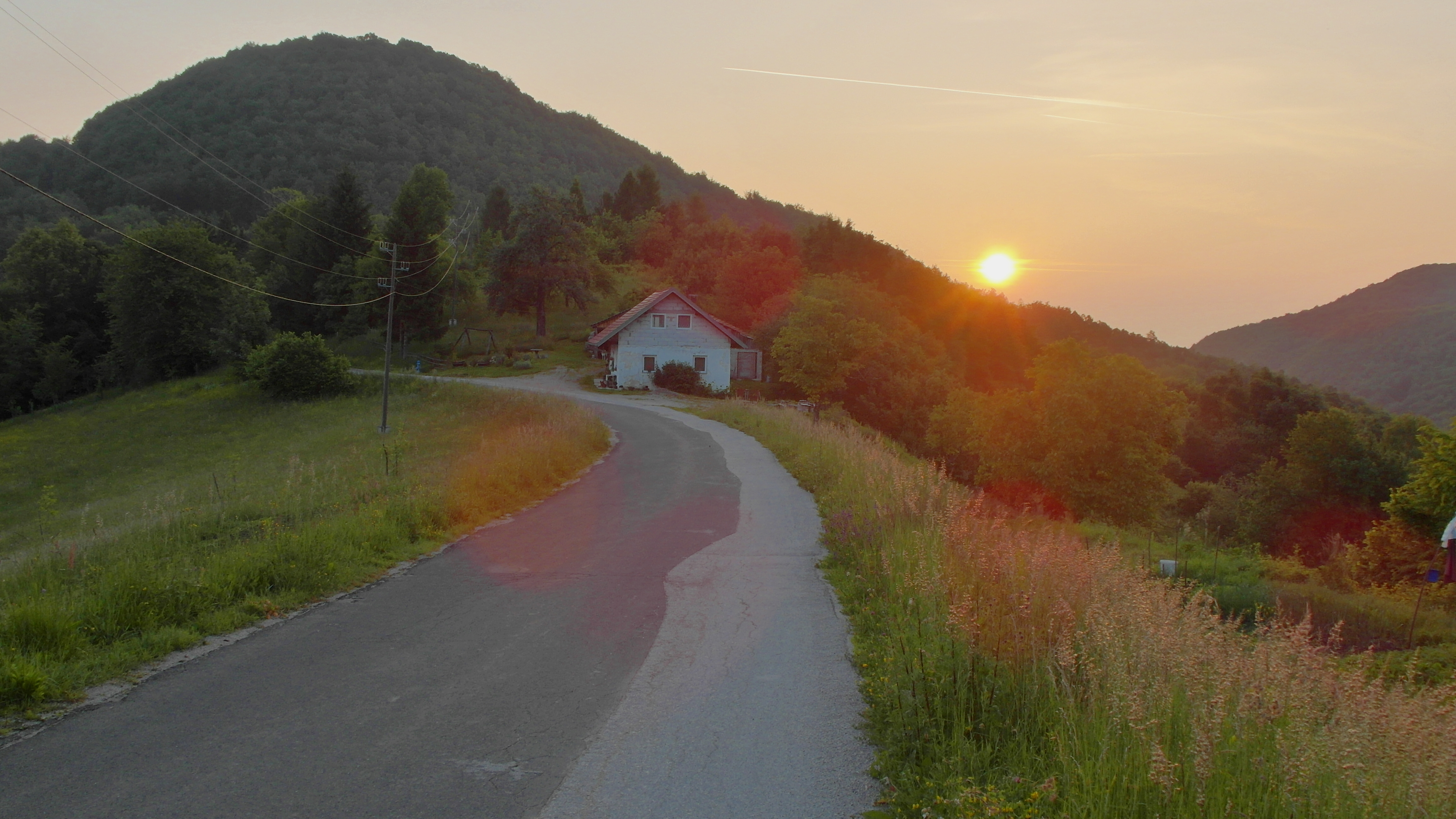 VÝCHOD SLNKA V HORÁCH - SUNRISE IN THE MOUNTAINS